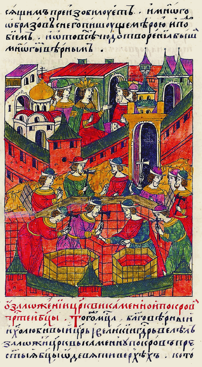 Лицевой летописный свод